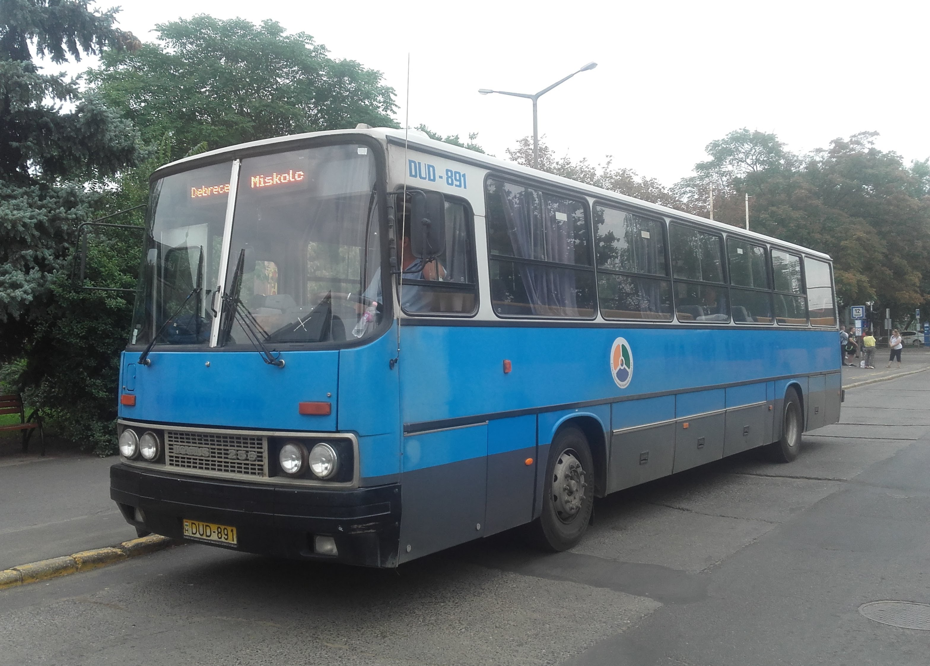 Az ÉMKK DUD-891 rendszámú Ikarus 256 típusú busza Debrecenben, a 1372-es helyközi járaton.